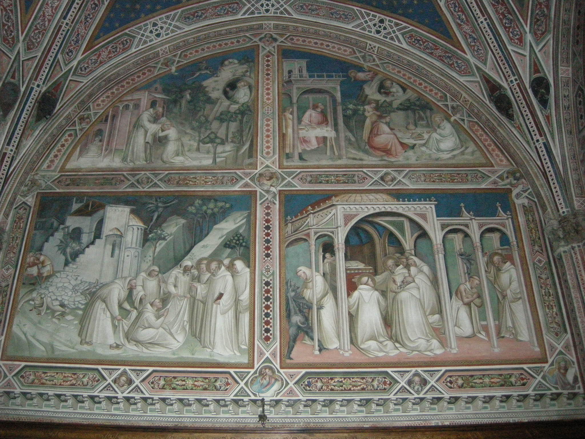 Spinello aretino, storie di san benedetto